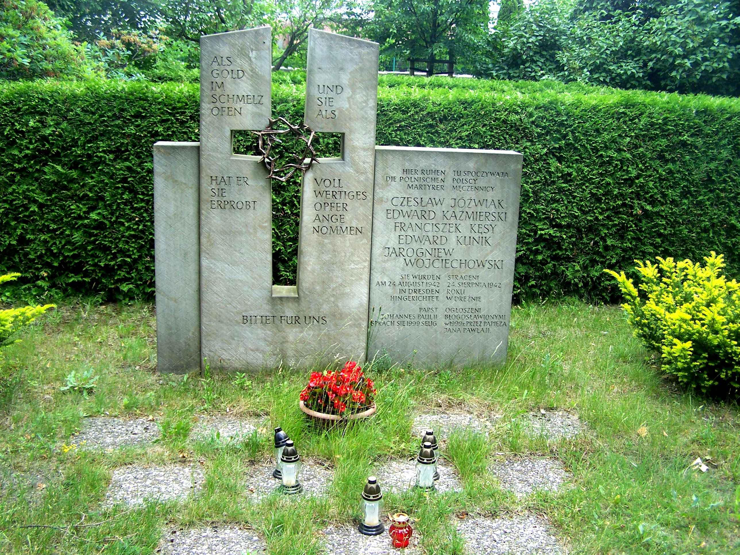 Dresden, Neuer Katholischer Friedhof: Gedenkstätte für die fünf polnischen Märtyrer Czesław Jóźwiak (* 1919), Edward Kaźmierski (* 1919), Jarogniew Wojciechowski (* 1922), Franciszek Kęsy (* 1920) und Eduard Klinik (* 1919), die 1942 auf dem Hof des Gefängnisses am Münchner Platz hingerichtet wurden